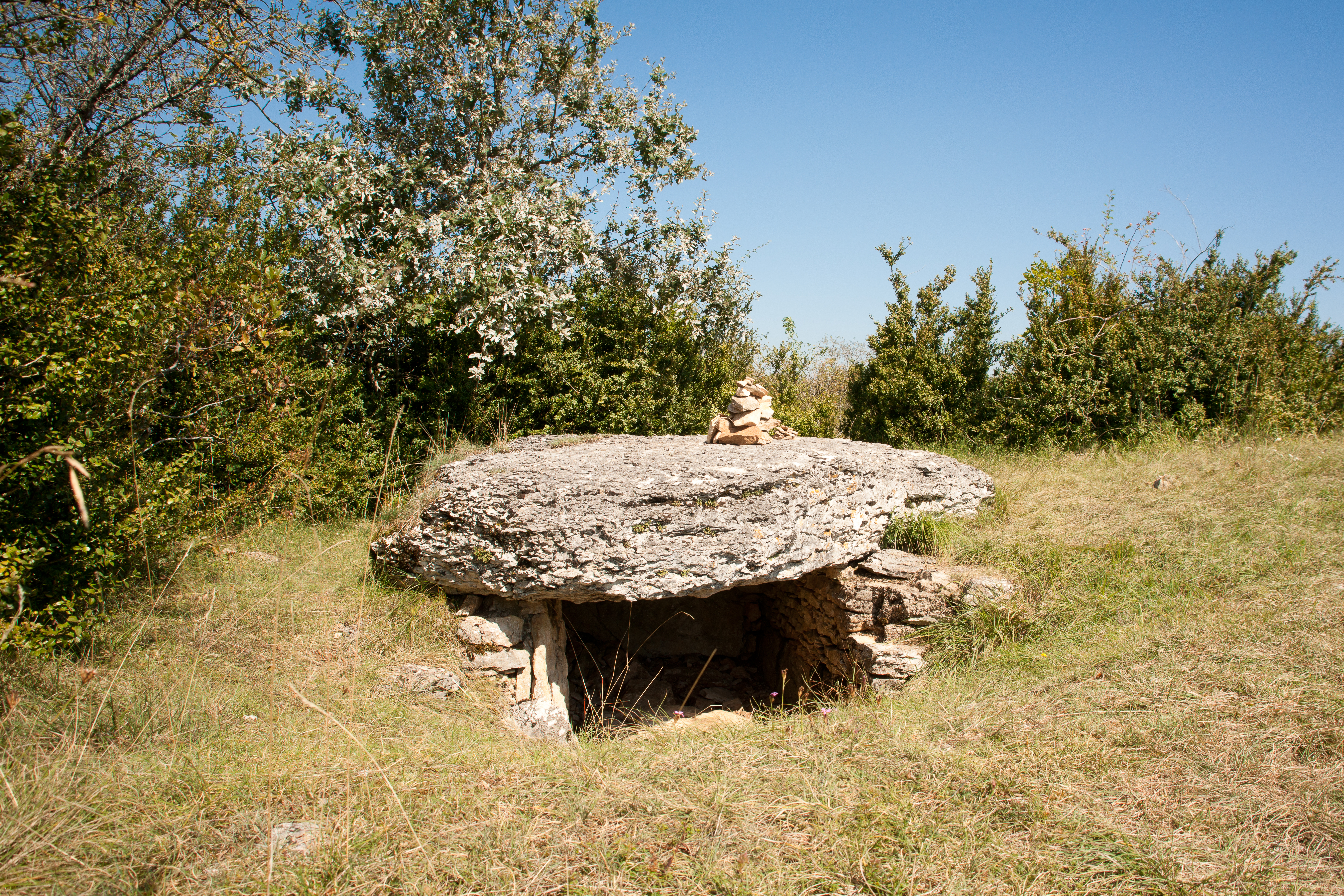 Tumulus-dolmens du Mont-de-Senne .